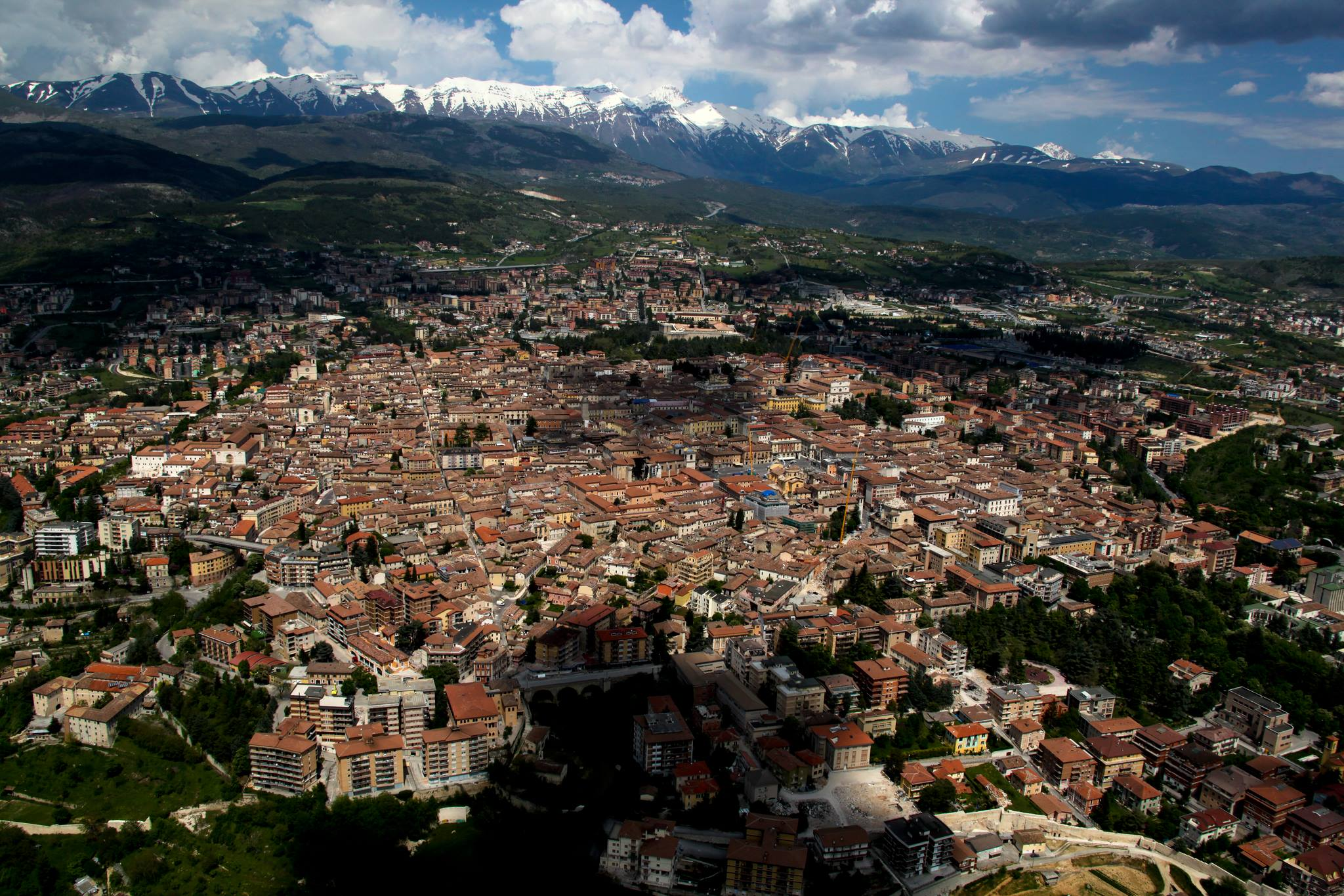 Panorama dell'Aquila pochi giorni dopo il terremoto del 2009